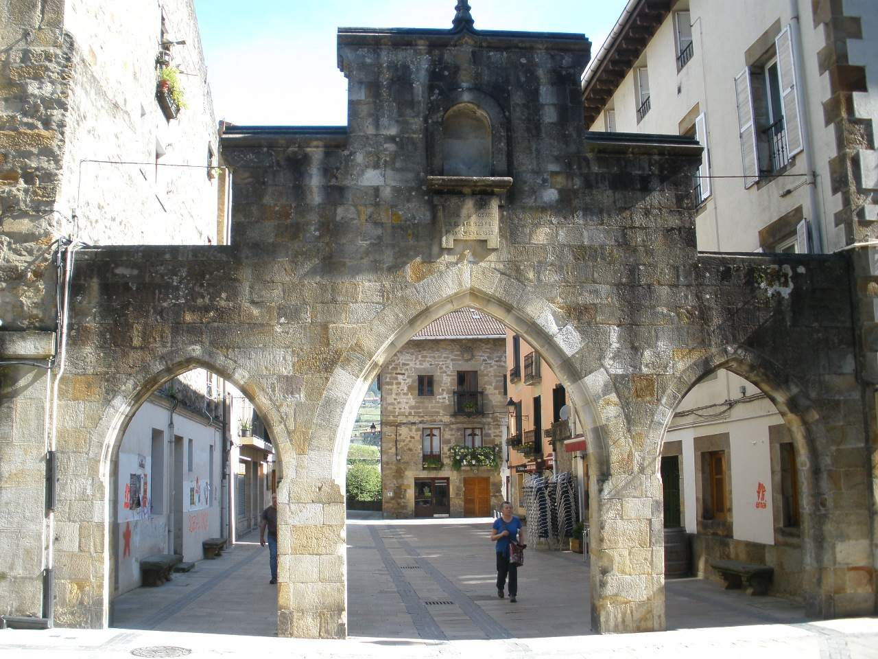 Elorrio (Vizcaya)